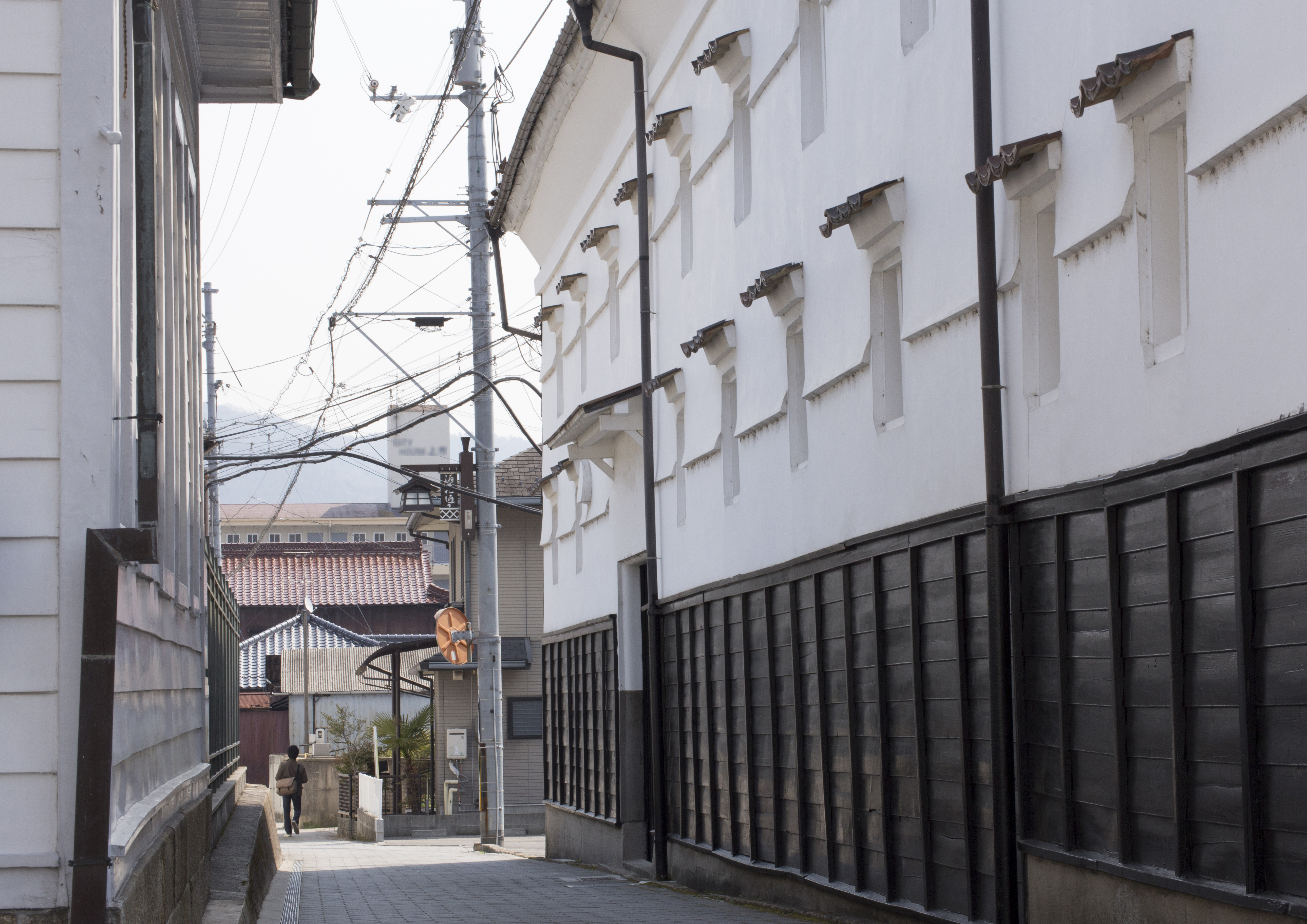 酒蔵（西条町、2014年3月）